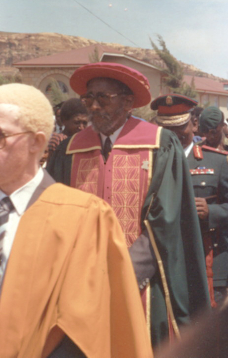 Conferment of Degrees at National University of Lesotho, from left: Students' representative, King Moshoeshoe II., Major General Justin Lekhanya, 1988 (date unknown)